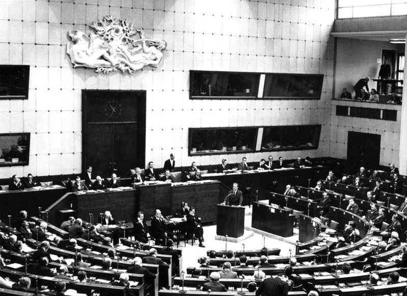 24.1.1967 Bundesminister Willy Brandt Versammlung des Europarates in Straßburg